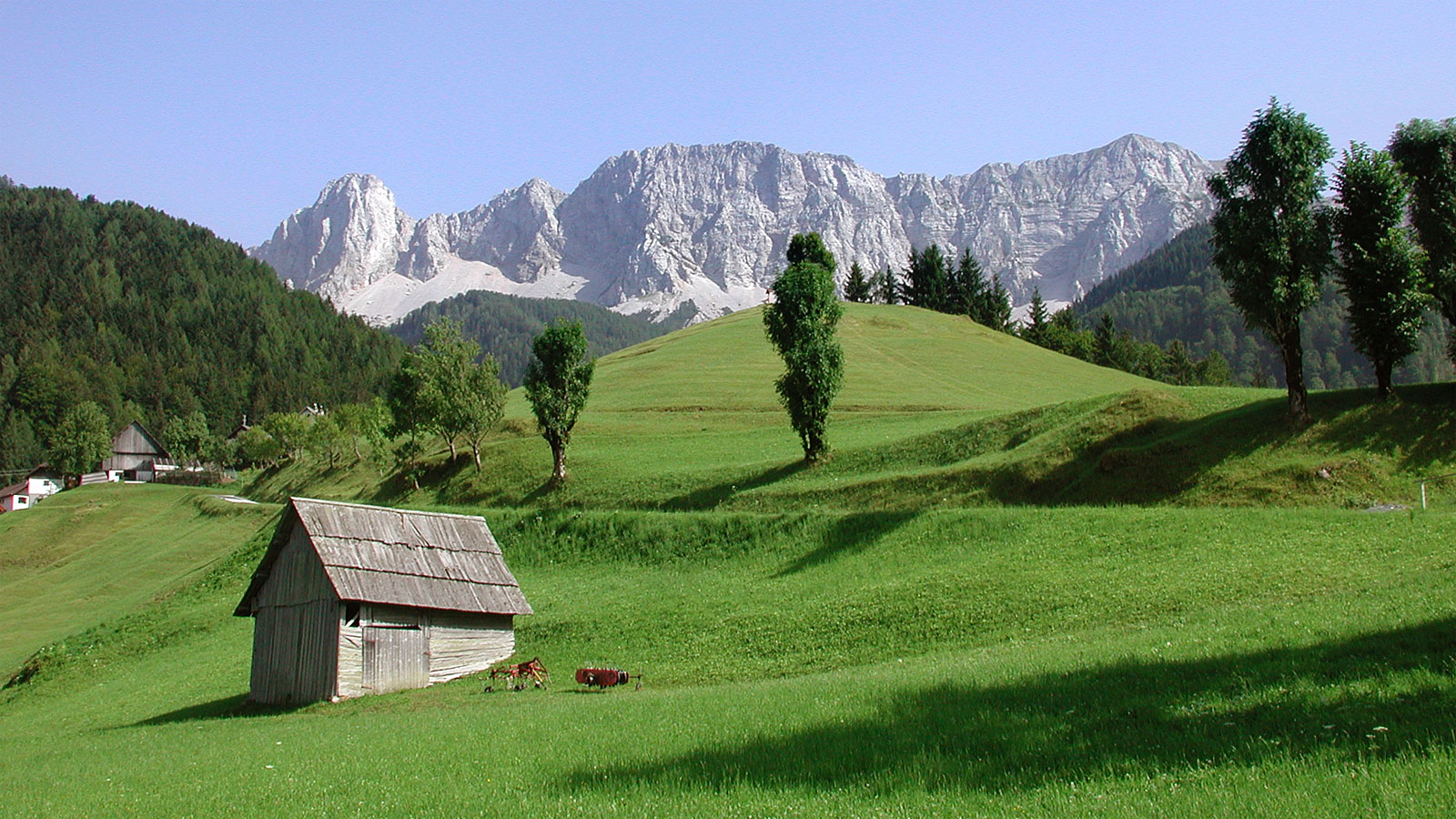 Koschuta mit Koschutnikturm (2136 m) von Zell-Pfarre (Sele-Fara) aus gesehen.